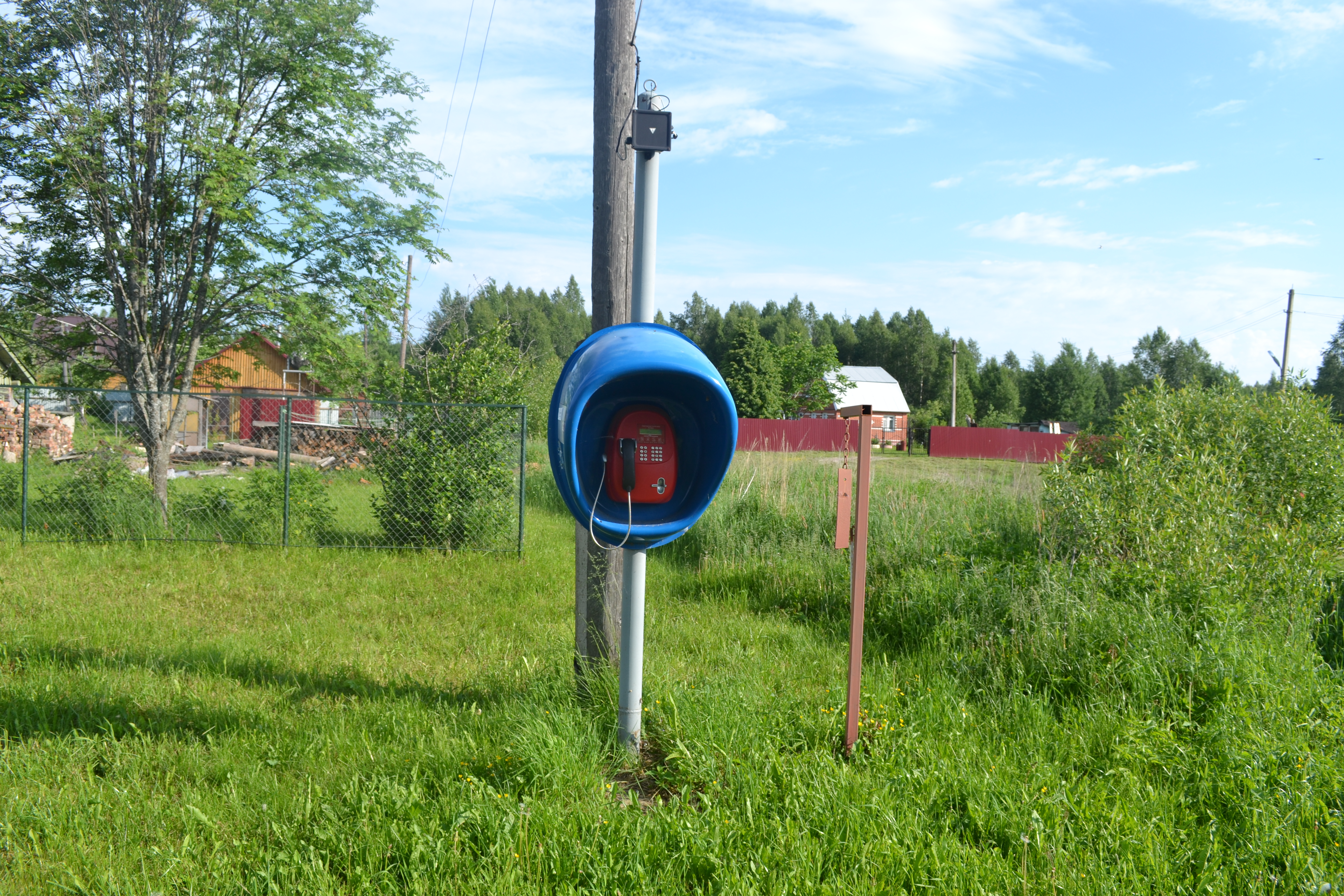 Телефон в деревне Семёновская (Пышлицкое сельское поселение)